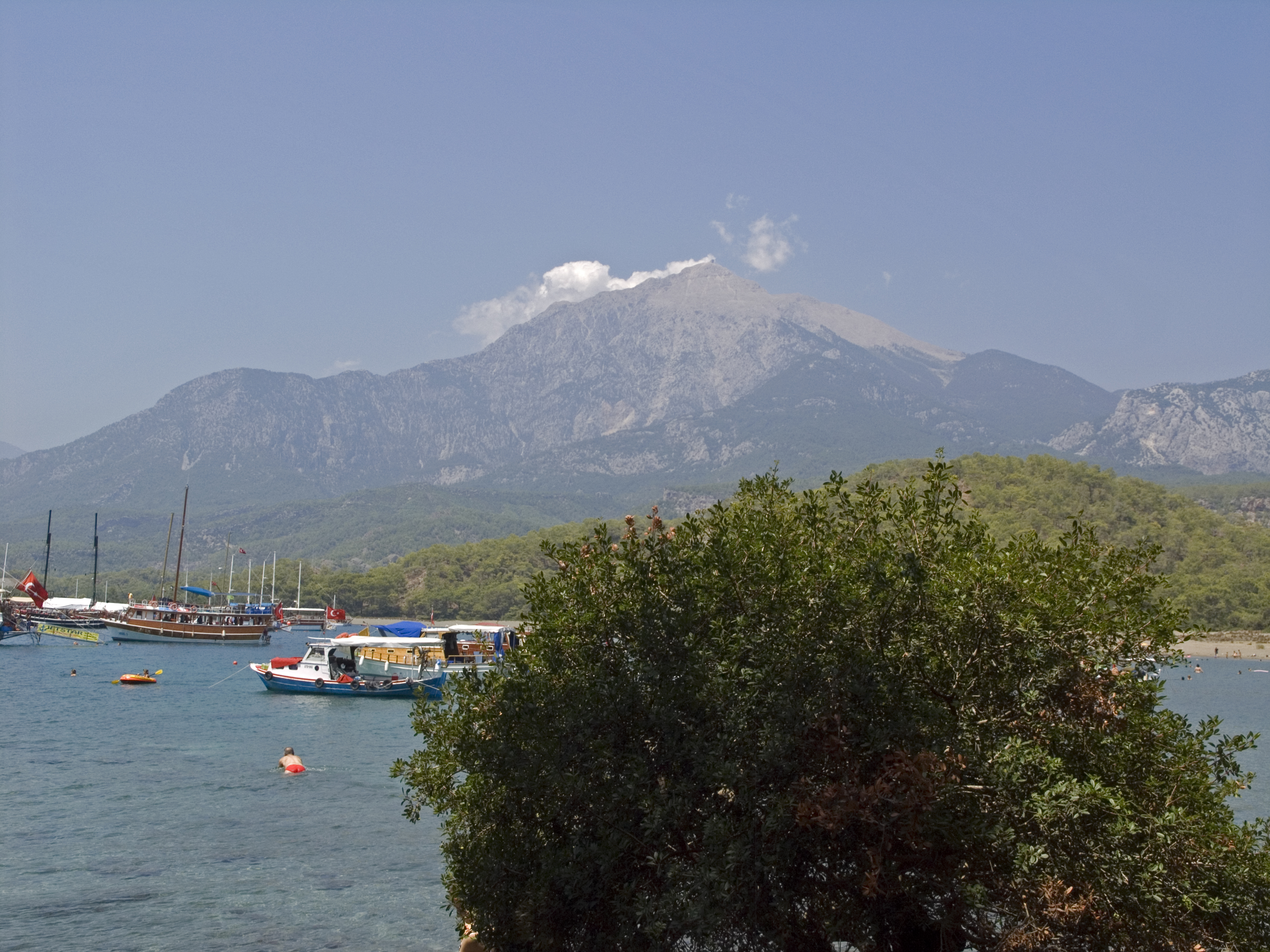 Турция, Кемер, вид на гору Тахталы из Фазелиса